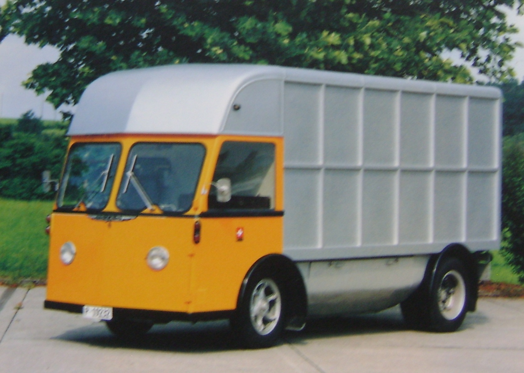 MOWAG Fourgon PTT kurze ausführung